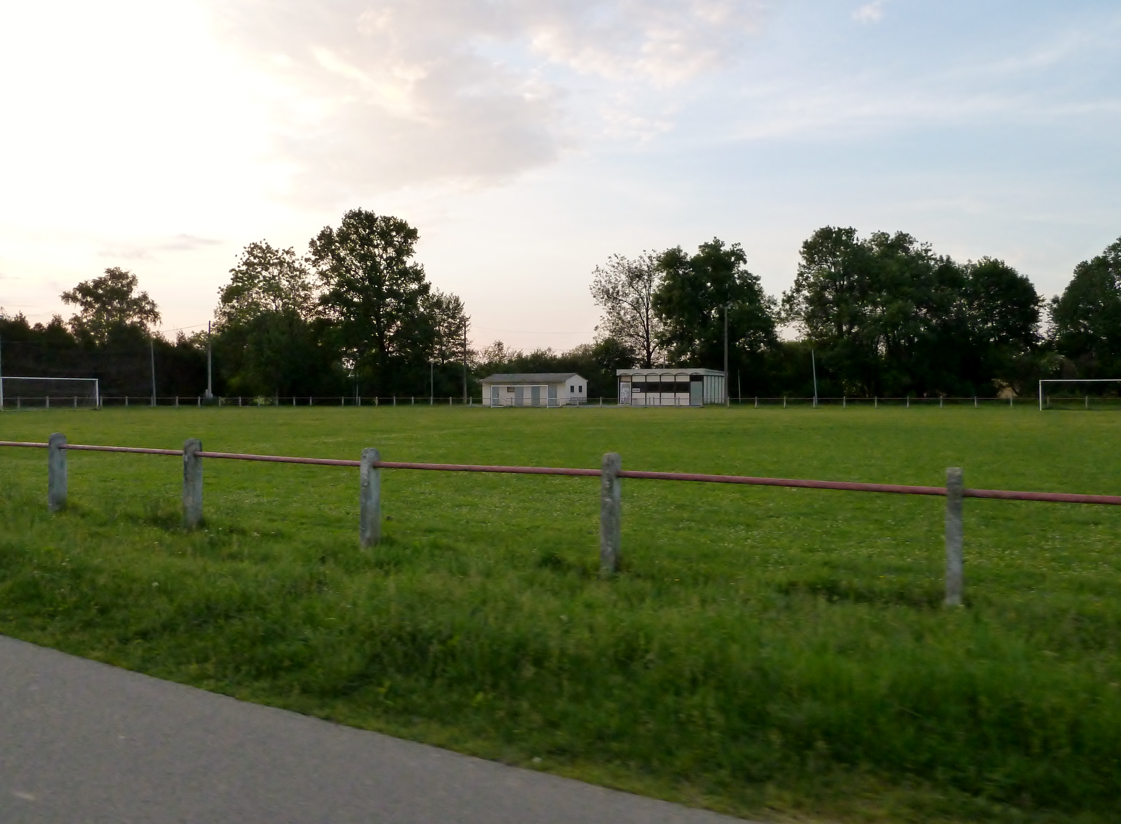 Terrain de football de Sendets (Pyrénées-Atlantiques)